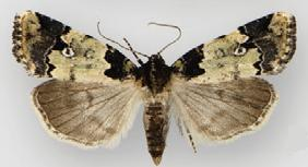 Bryolymnia marti female